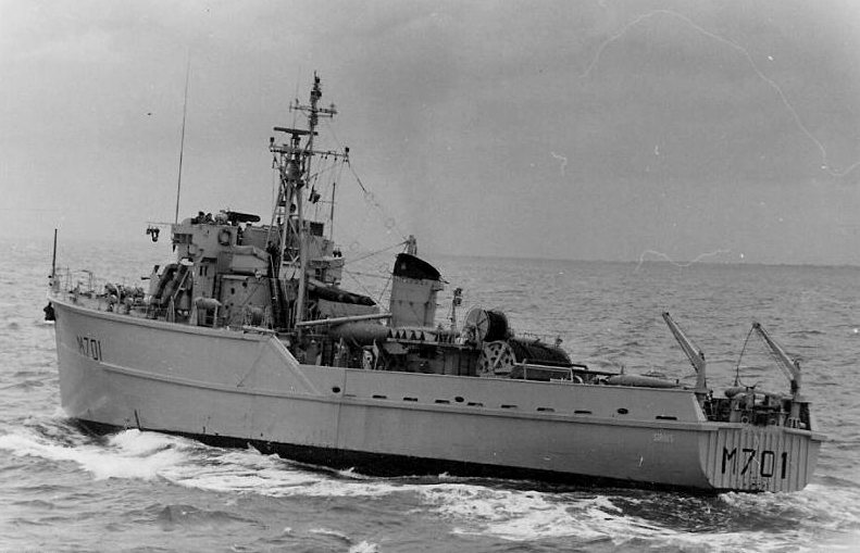 Dragueur de mines Sirius